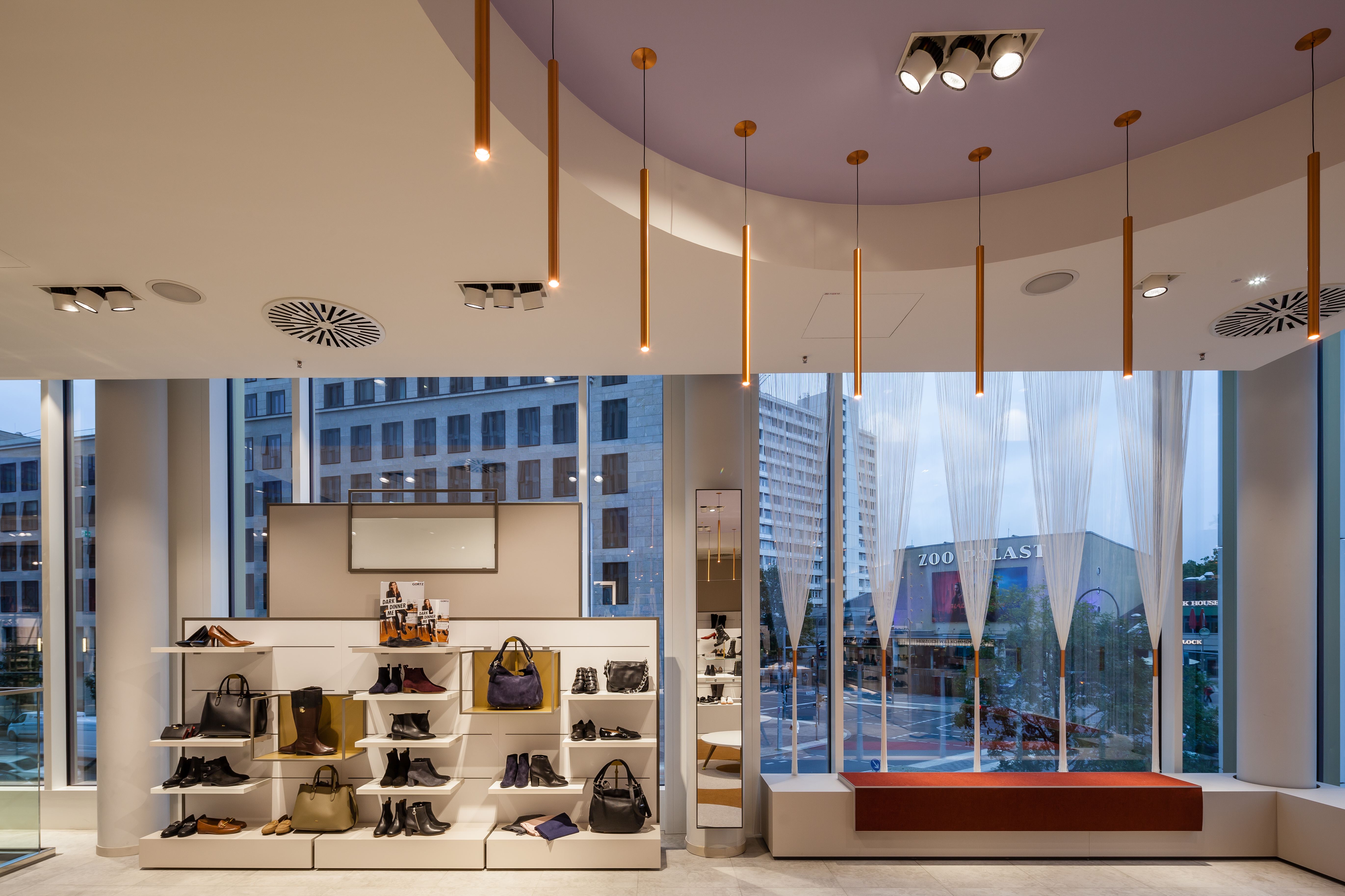 Görtz Flagshipstore Berlin 1. Obergeschoss